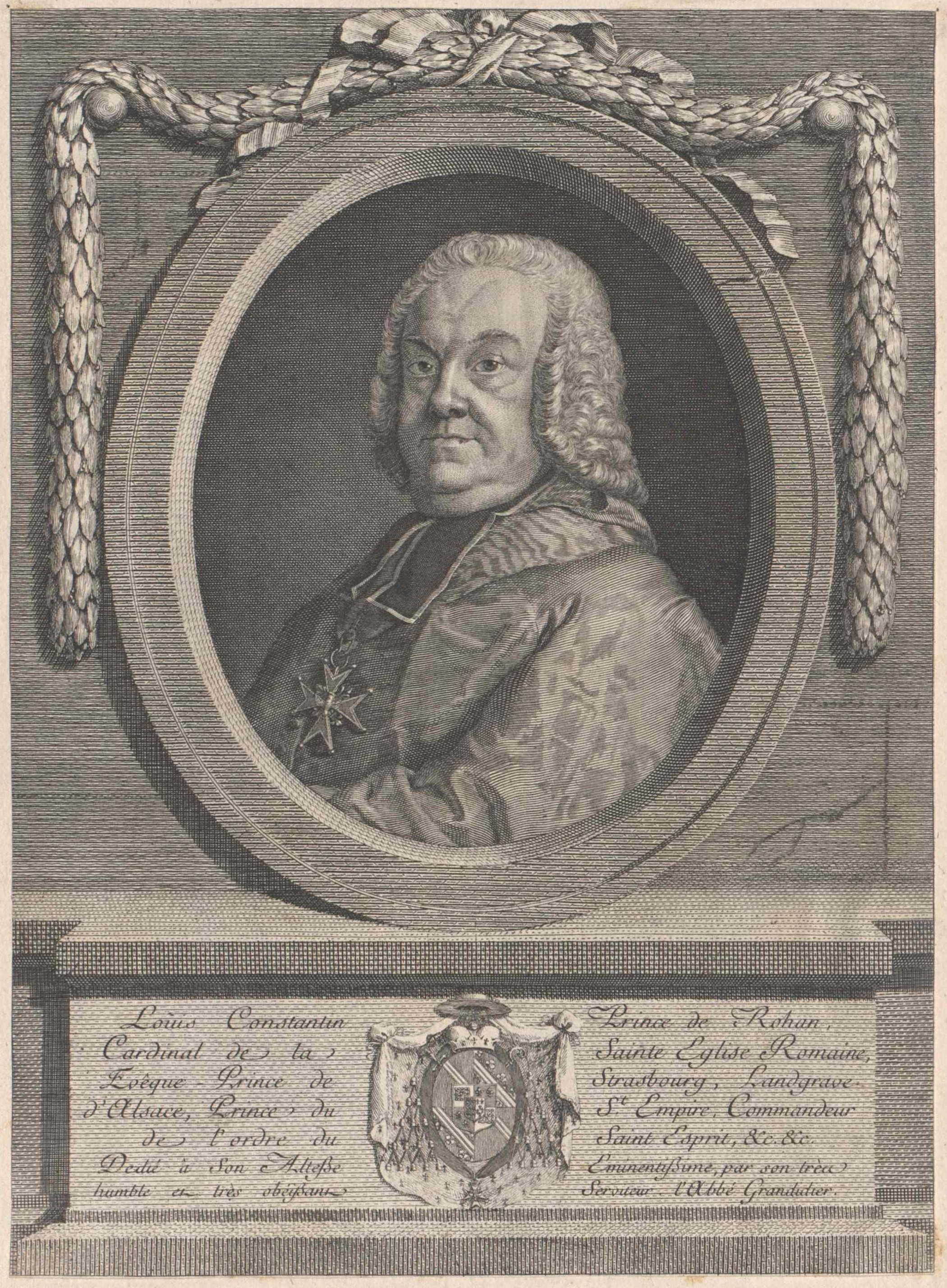 Ludwig Konstantin von Rohan-Guéméné, Bischof von Straßburg, Kardinal